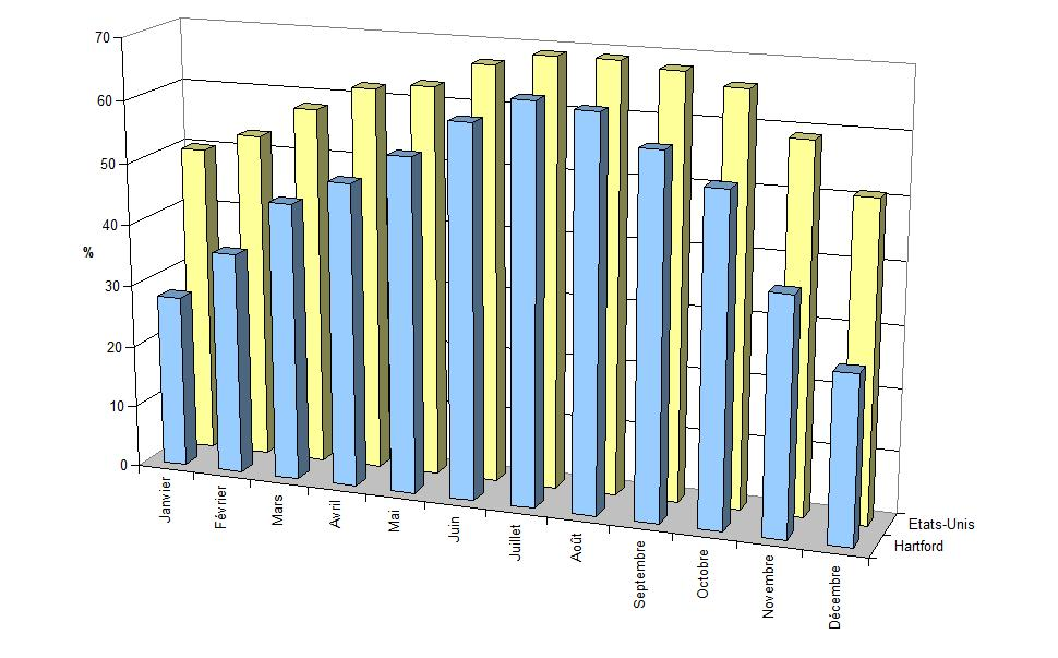 Ensoleillement mensuel moyen, à Hartford (Michigan) et dans l'ensemble des Etats-Unis.